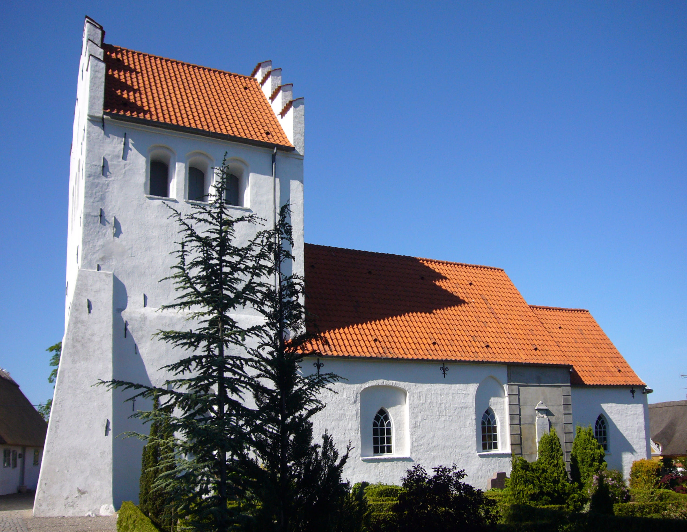 Greve Kirke, Roskilde County, Denmark.